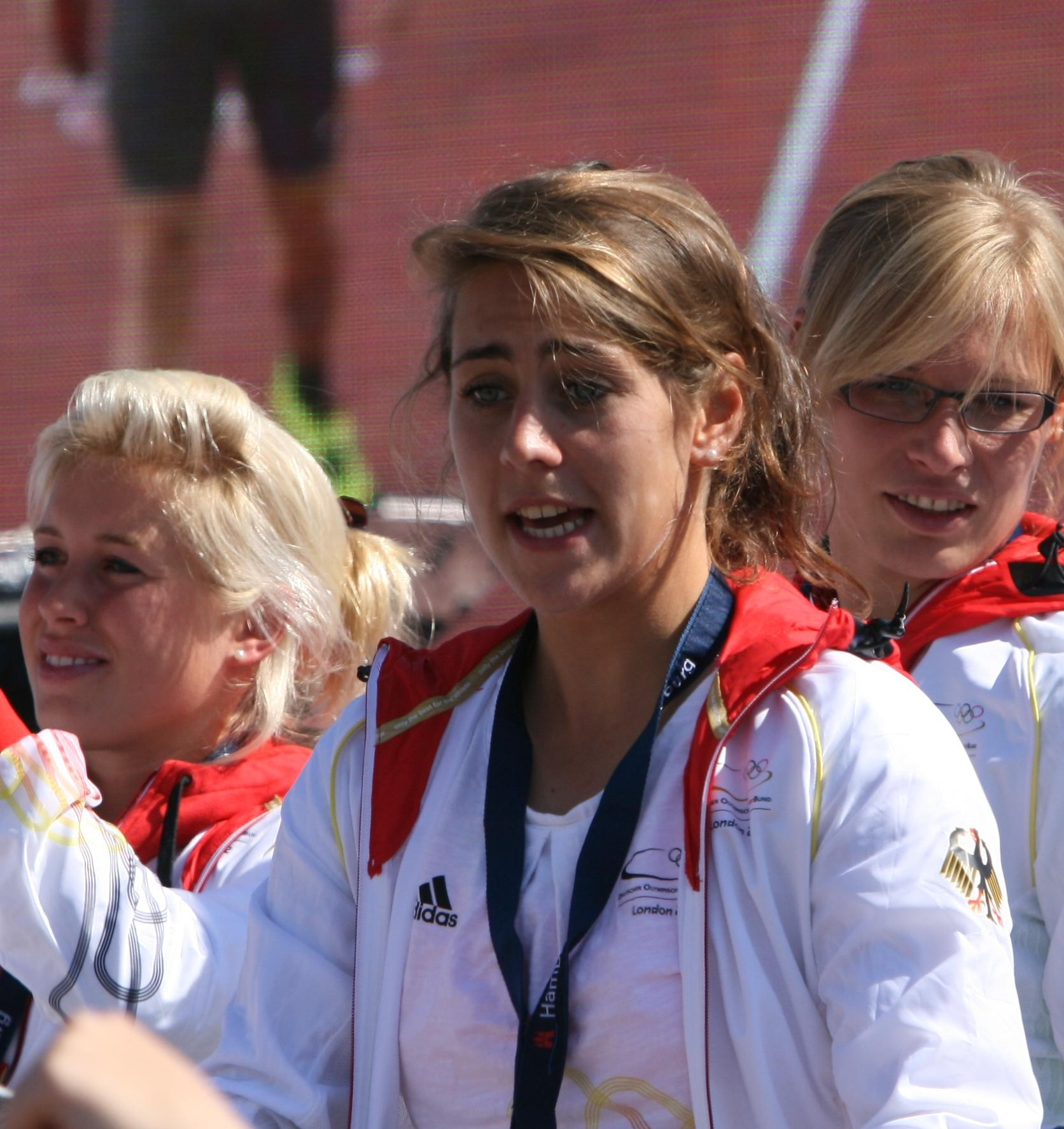 Marie Mävers beim Empfang der Olympioniken 2012 in Hamburg, links Kristina Hillmann, rechts Kristina Reynolds